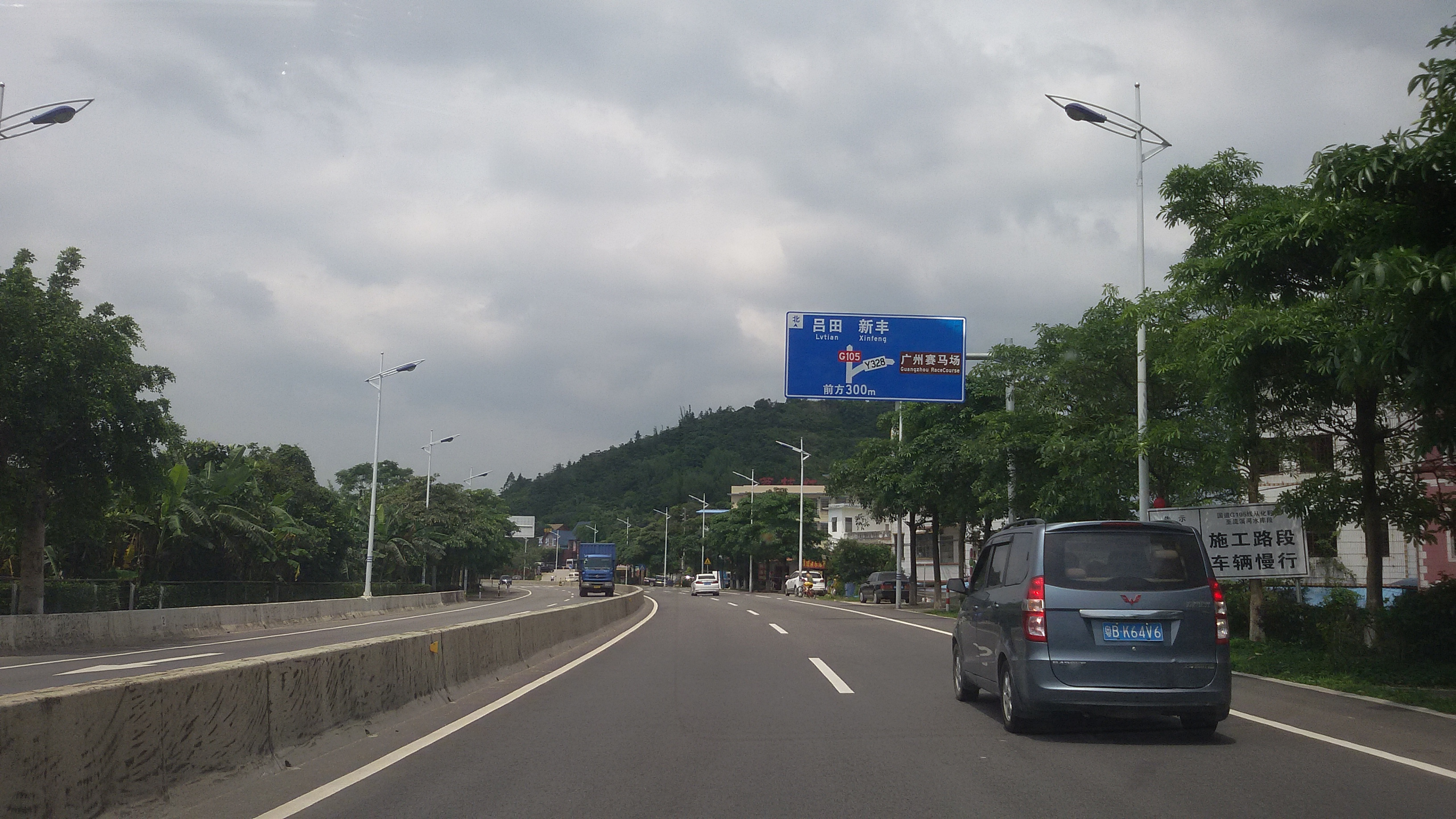 粵語: 從化良口鎮嘅新城南路